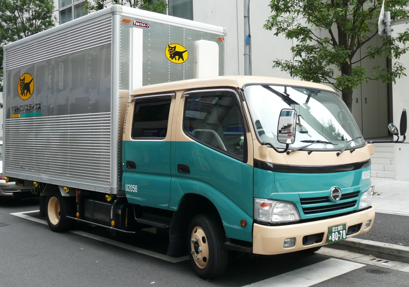 Hino Duroto.